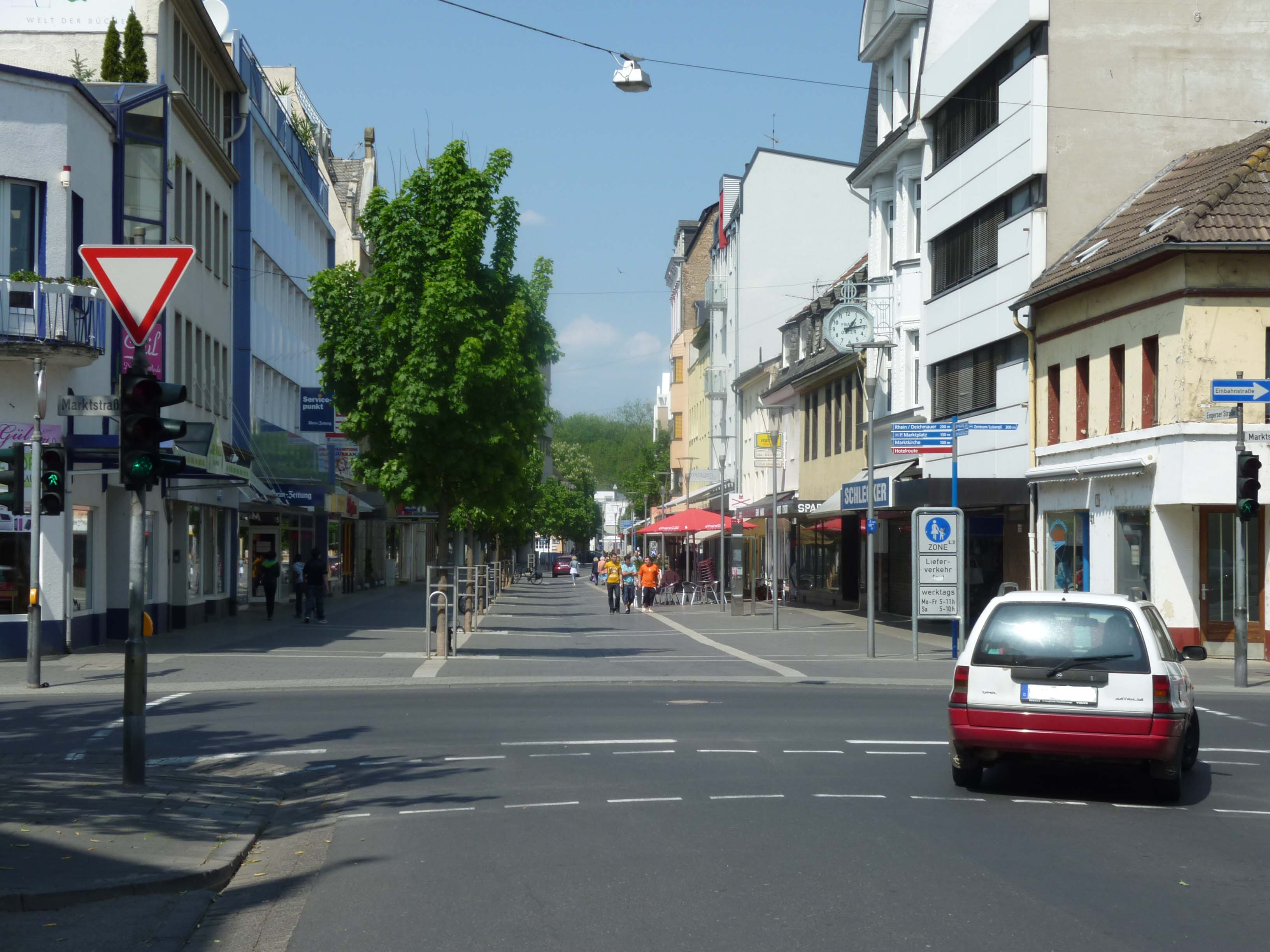 Blick in die Fußgängerzone Engerserstr. Neuwied